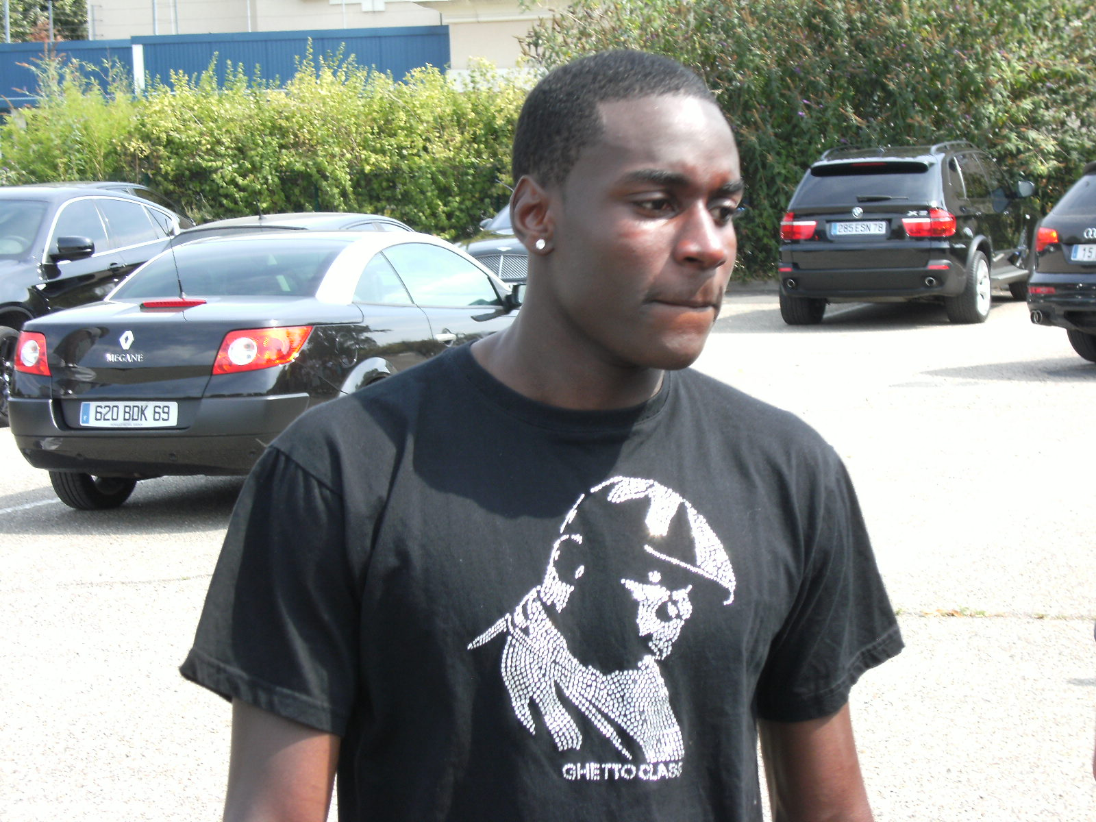 Granddi Ngoyi au Camp des Loges